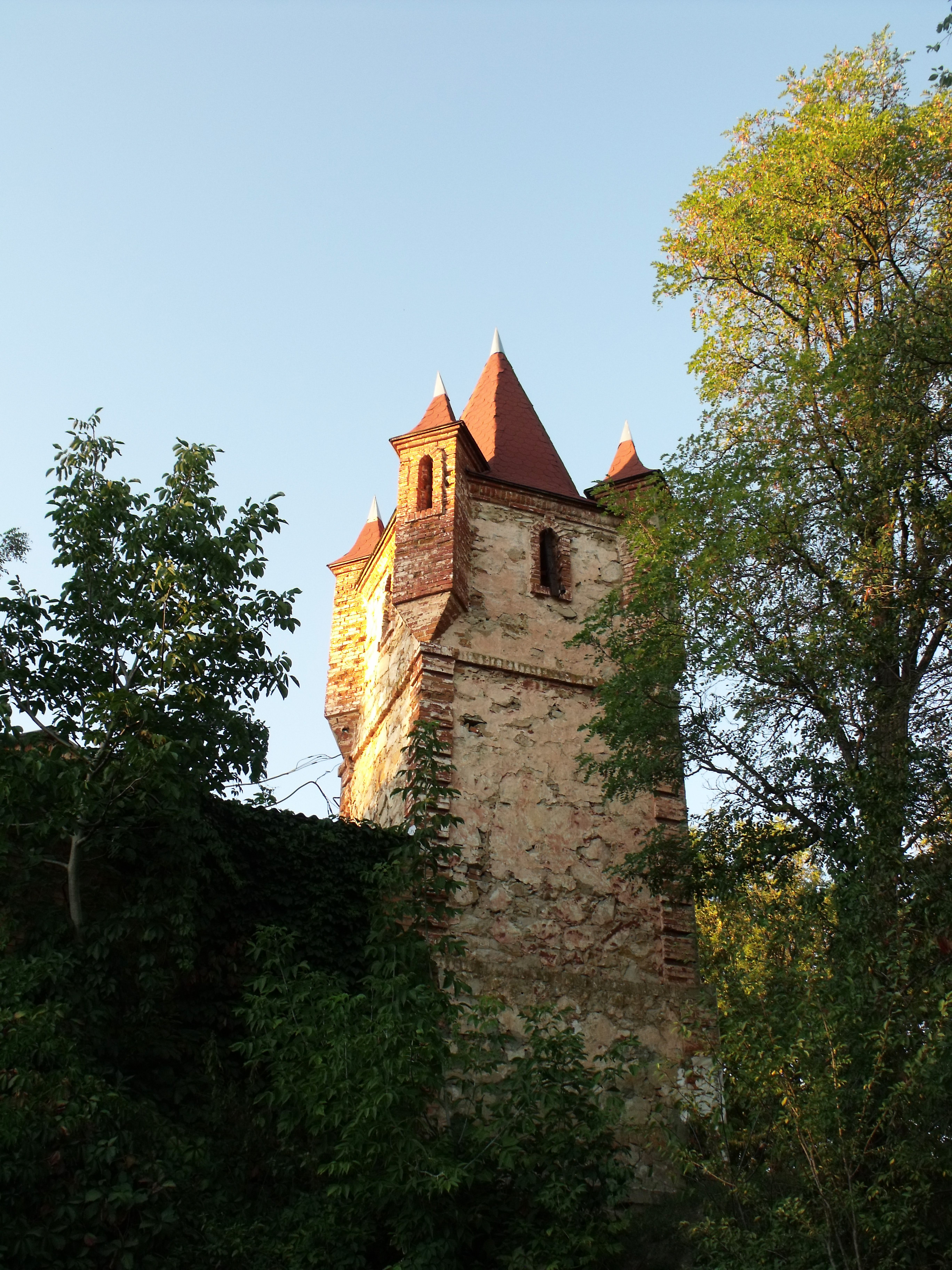 Садиба Гейдена - Вежа в парку: Вінницька область, Тиврівський район, смт.Сутиски